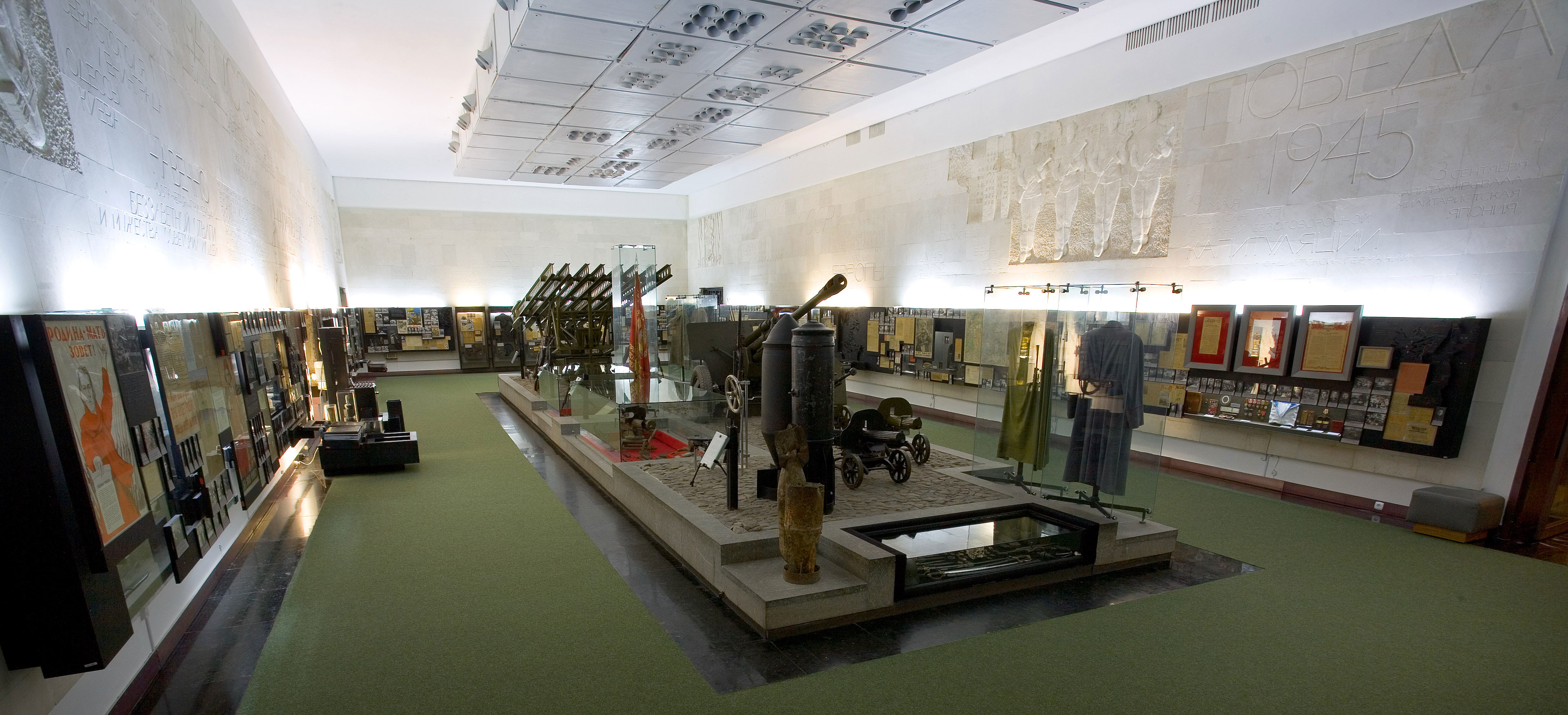 Зала №7. Друга світова війна на Дніпропетровщина